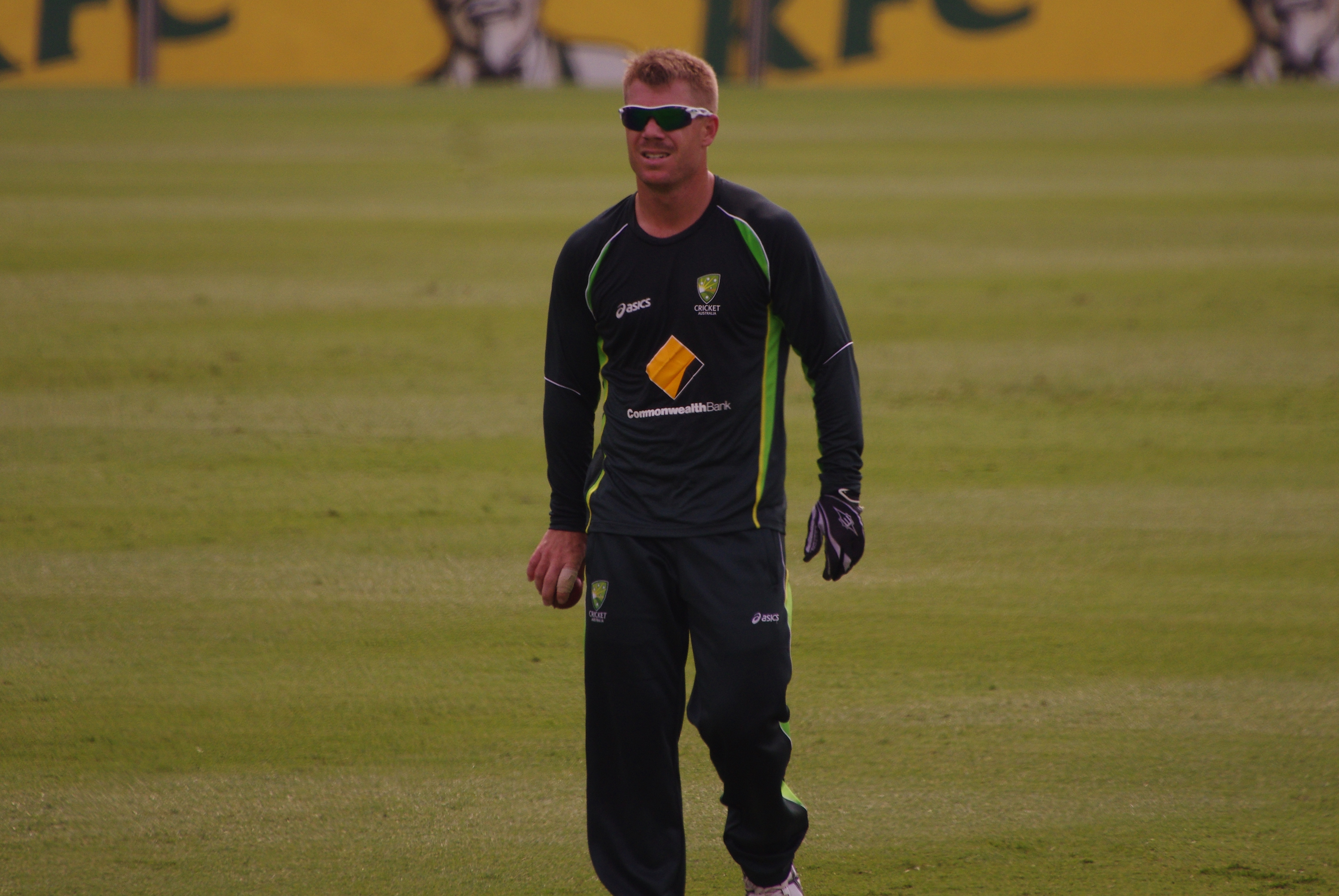 DAVID WARNER